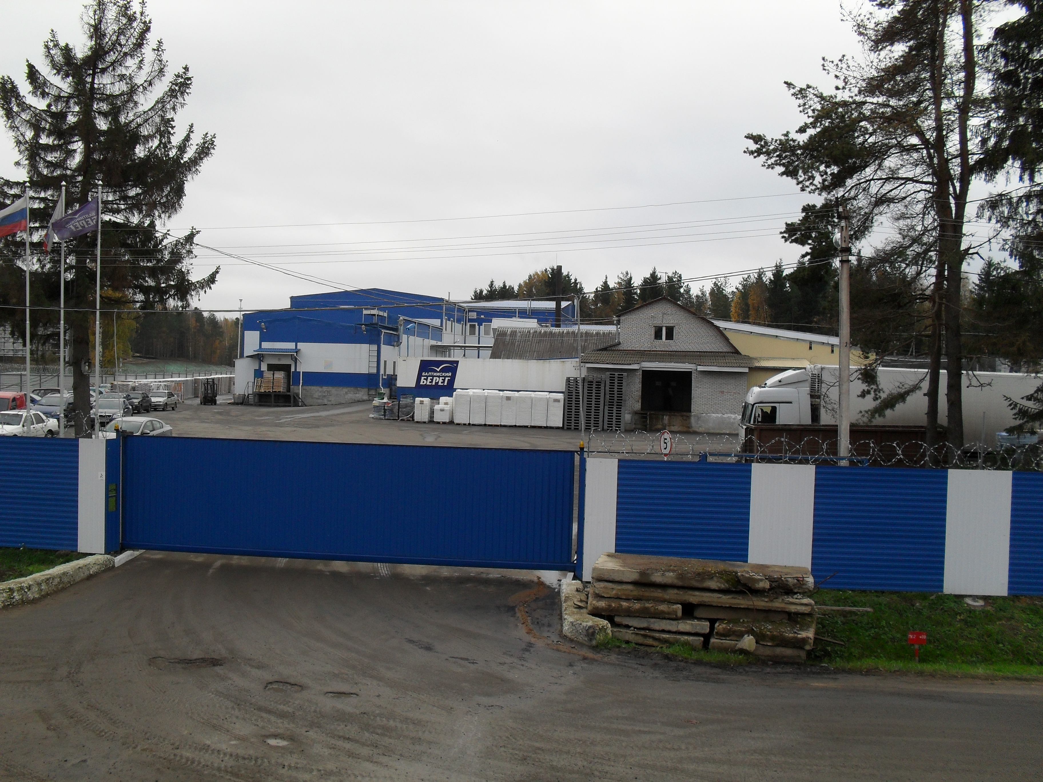 ЗАО «Балтийский берег» в деревне Пеники